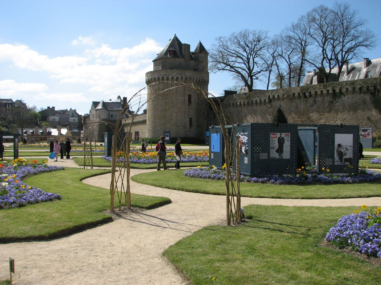 Jardin des remparts de Vannes pendant l'exposition Photo de mer 2007